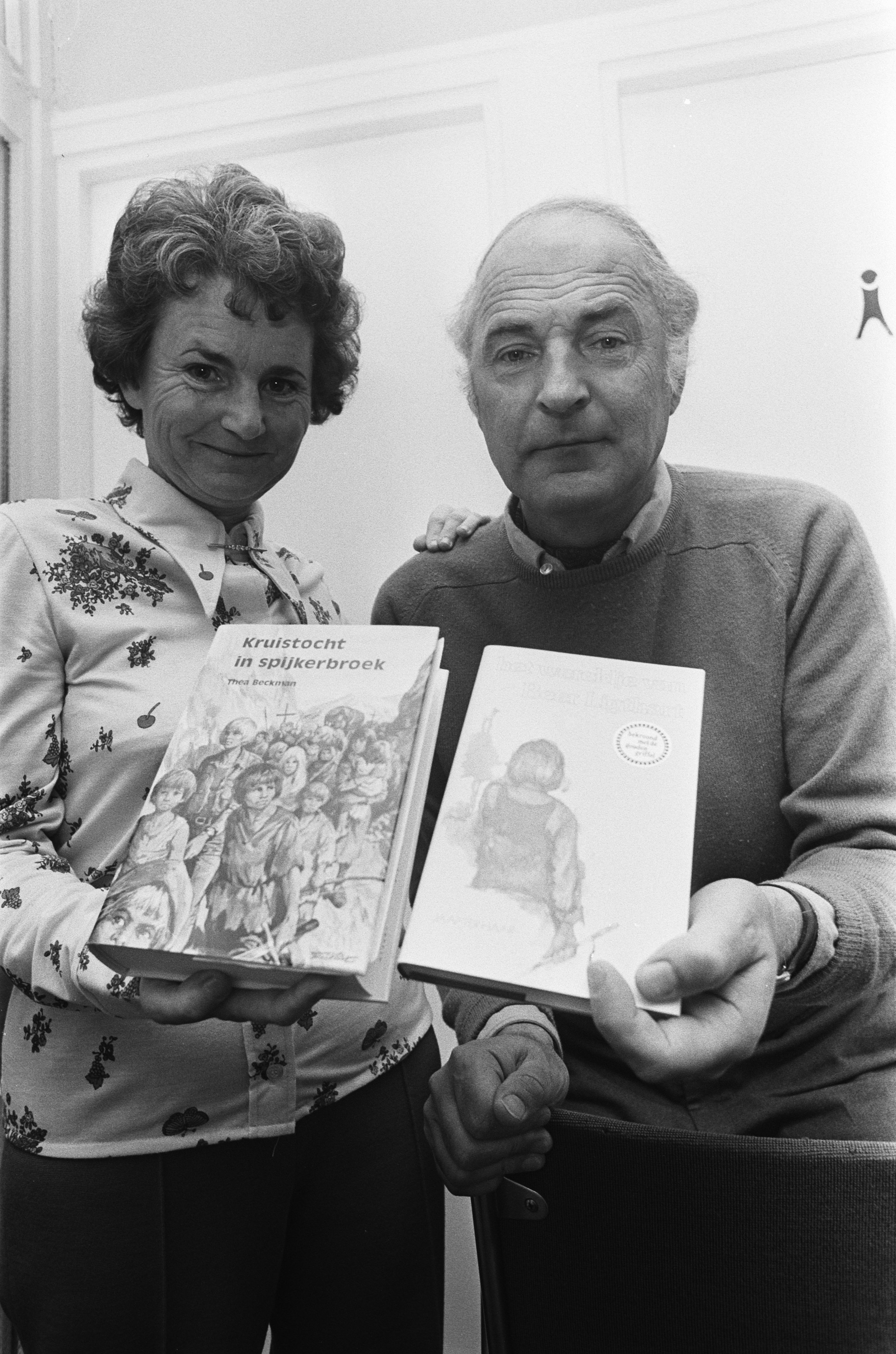 Winnaars van beste Jeugd- en Kinderboeken bekend gemaakt Amsterdam t.g.v. Kinderboekenweek; Thea Beckman (l) met beste Jeugdboek en Jaap ter Haar (r) met beste Kinderboek. Datum 1 oktober 1974